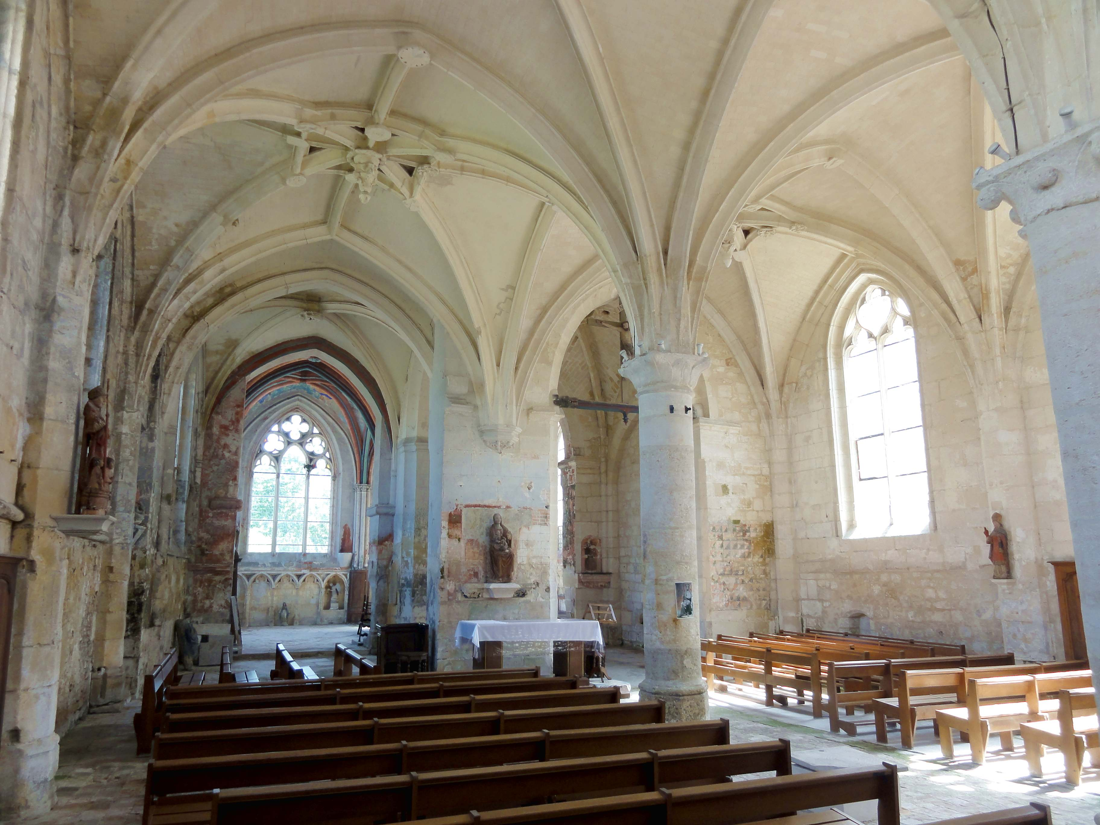 Intérieur de l'église (voir titre).